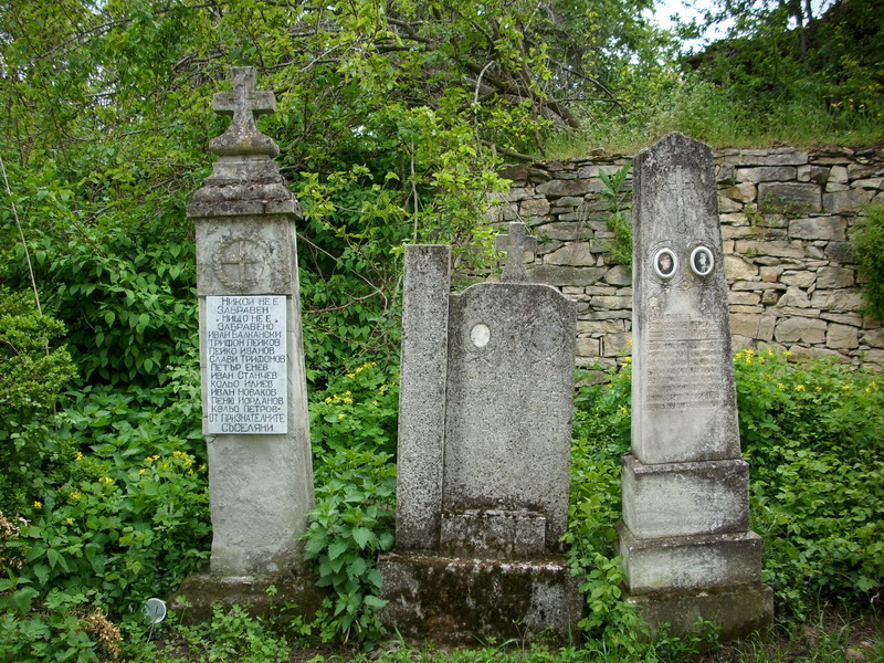 Село Бракница, община Попово - паметници на загиналите войници от селото в двора на църквата